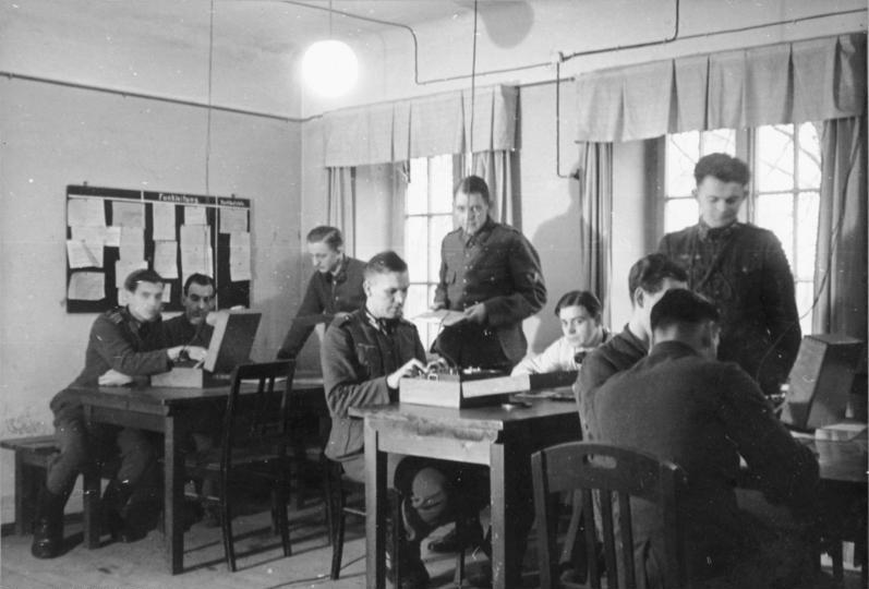 Schlüsselraum